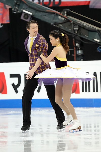 Кана Мурамото / Крис Рид (Япония) на чемпионате мира 2017